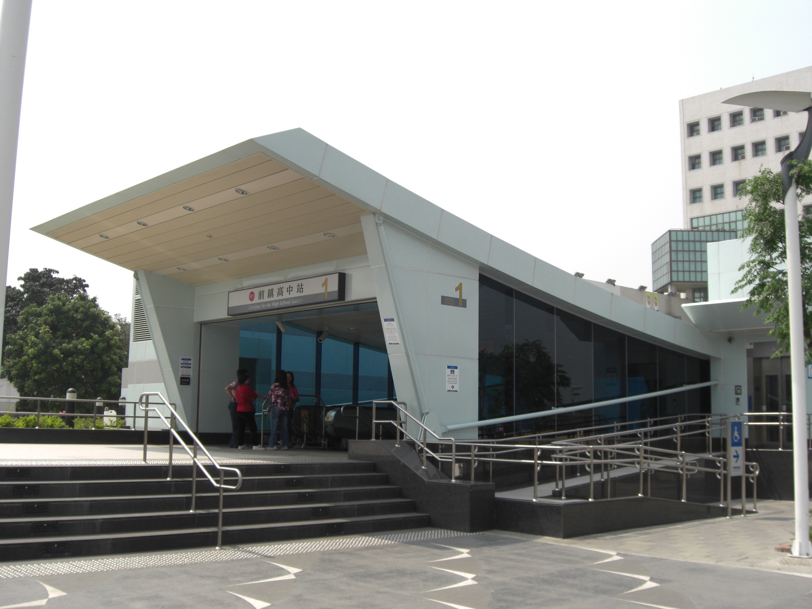 高雄捷運紅線前鎮高中站1號出口。